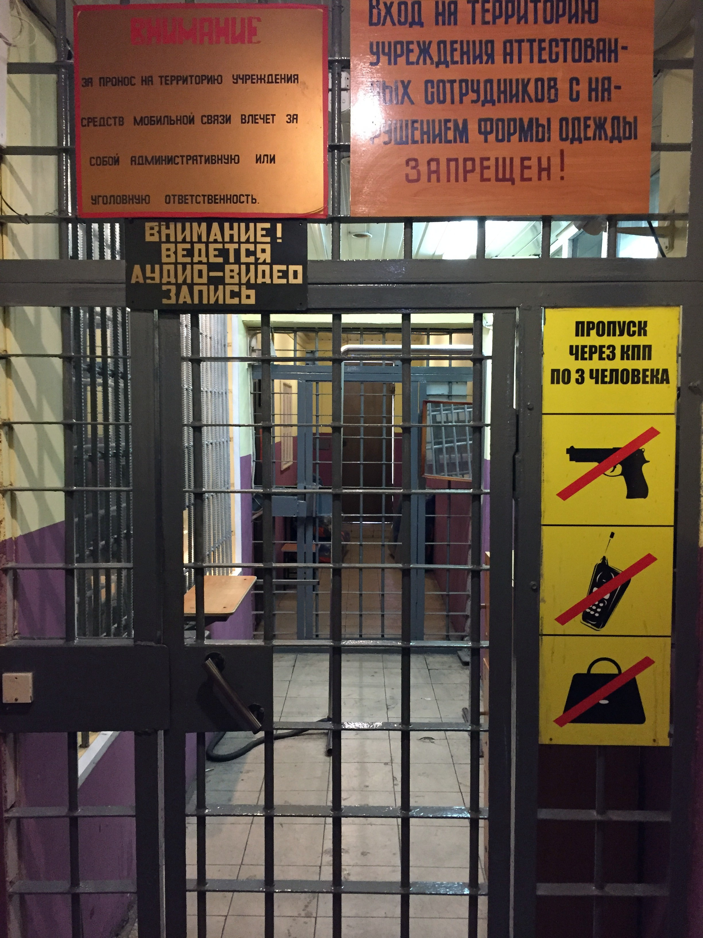 Вход